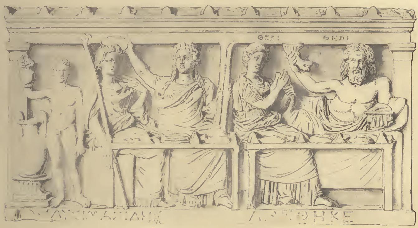 Das Relief zeigt die Zeremonie des "Nekrodeipnon". Es wurde gefunden in Eleusina, Athen, Griechenland.